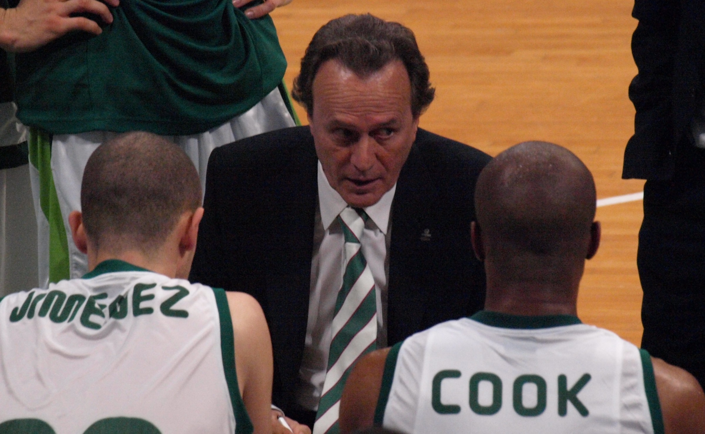 Aíto García Reneses en el partido que enfrentó al al Unicaja Málaga y al DKV Joventut de liga ACB en el Olímpico de Badalona en febrero de 2009.